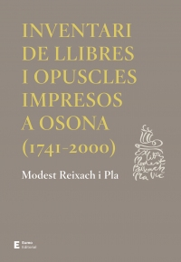 Portada de llibre